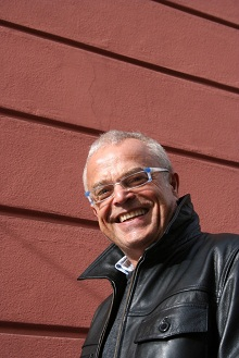 Abbildung Erwin Neuwirth